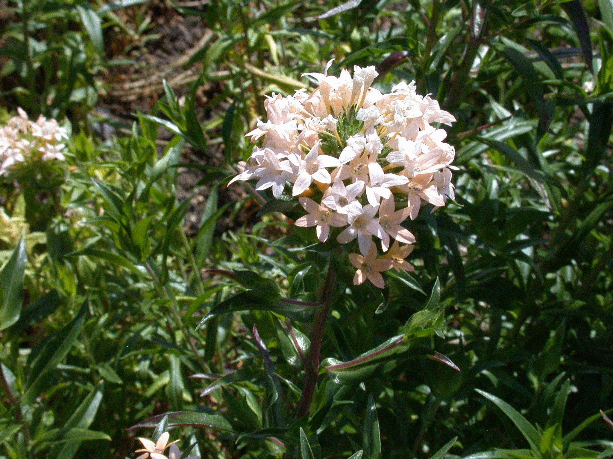 Specimen labelled: "Collomia grandiflora. Polemoniaceae."